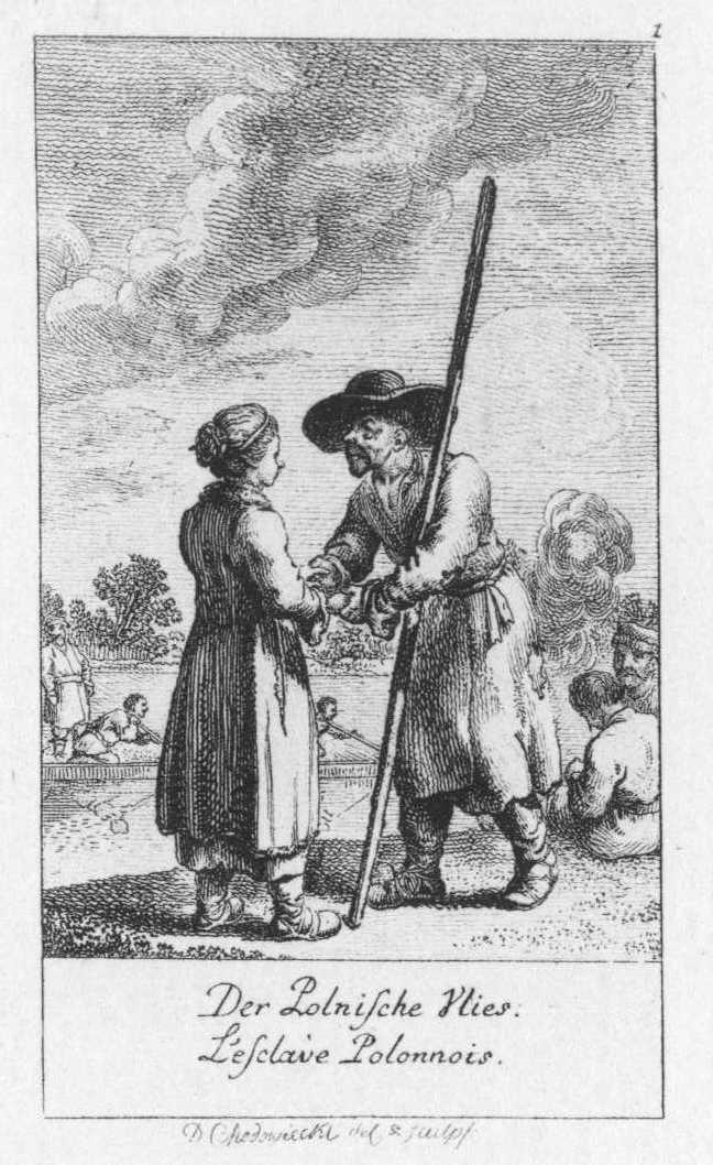 Heirathsanträge. Zweite Folge. (Beschreibung lt. Quelle) Blatt 1 Blatt 2 Blatt 3 Blatt 4 Blatt 5 Blatt 6 Blatt 7 Blatt 8 Blatt 9 Blatt 10 Blatt 11 Blatt 12 der Serie